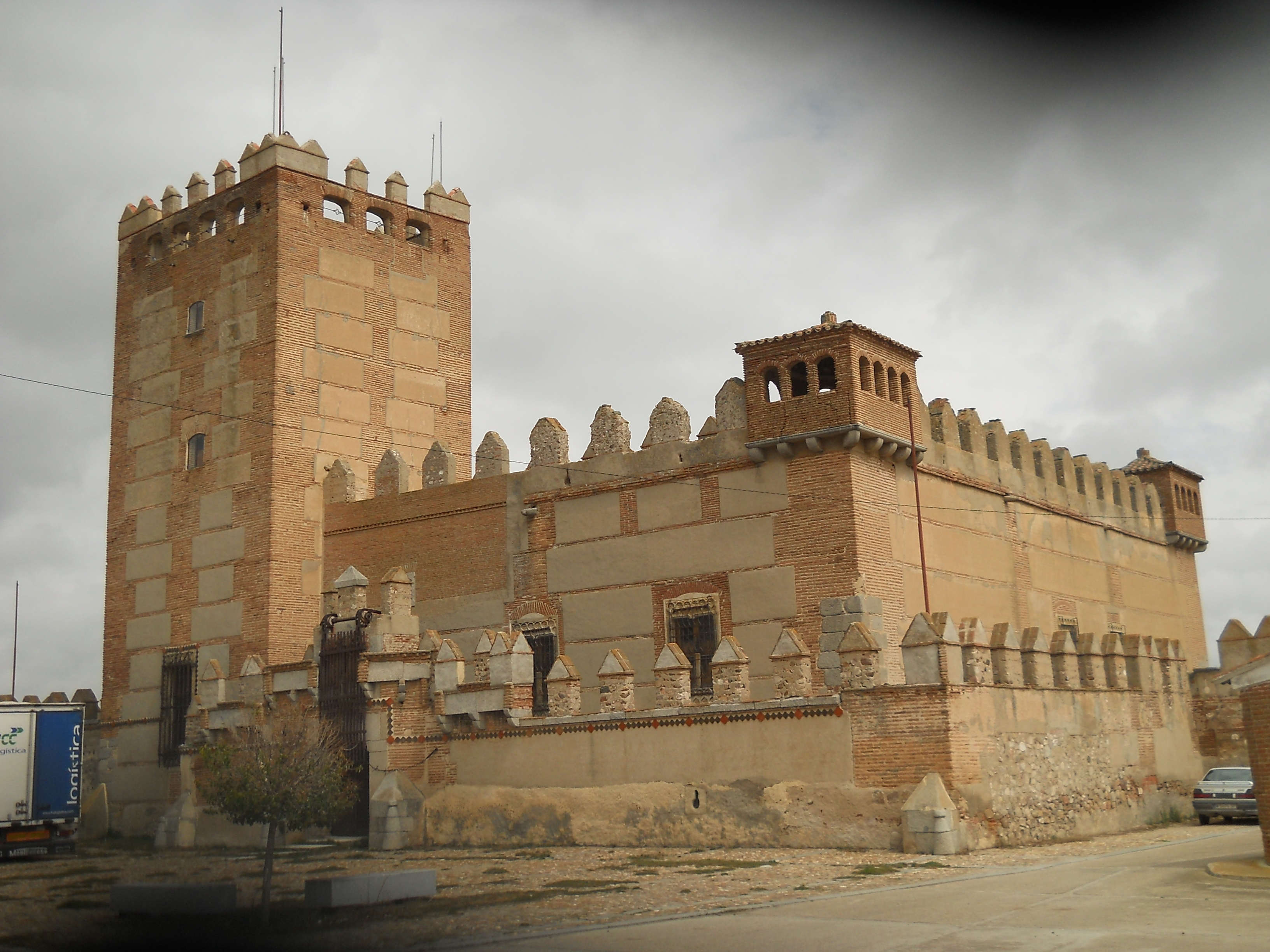 Castello di Narros de Saldueña, Ávila, Spagna